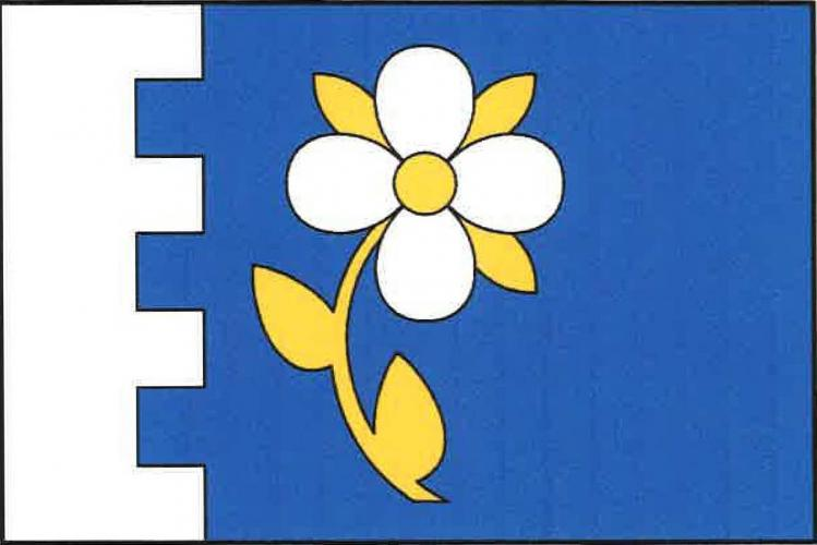 vlajka, Mnichovice, okres Benešov